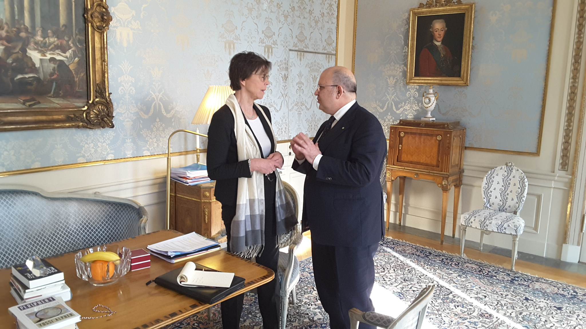 O Αναπληρωτής Υπουργός Εξωτερικών, αρμόδιος για τις Ευρωπαϊκές Υποθέσεις, Νίκος Ξυδάκης, κατά τη διάρκεια επίσκεψης στη Στοκχόλμη, συνάντησε διαδοχικά στη Στοκχόλμη την Υφυπουργό Εξωτερικών κα Annika Söder, τον Υφυπουργό Ευρωπαϊκών Υποθέσεων παρά τω Πρωθυπουργώ, κ. Hans Dahlgren, την Υφυπουργό Οικονομικής Πολιτικής και Διεθνούς Οικονομικής Συνεργασίας κα Karolina Ekholm καθώς και την εκπρόσωπο του Κόμματος Μετριοπαθών για θέματα Εξωτερικής Πολιτικής και Αντιπρόεδρο της Επιτροπής Εξωτερικών Υποθέσεων του Σουηδικού Κοινοβουλίου, κα Karin Enström.